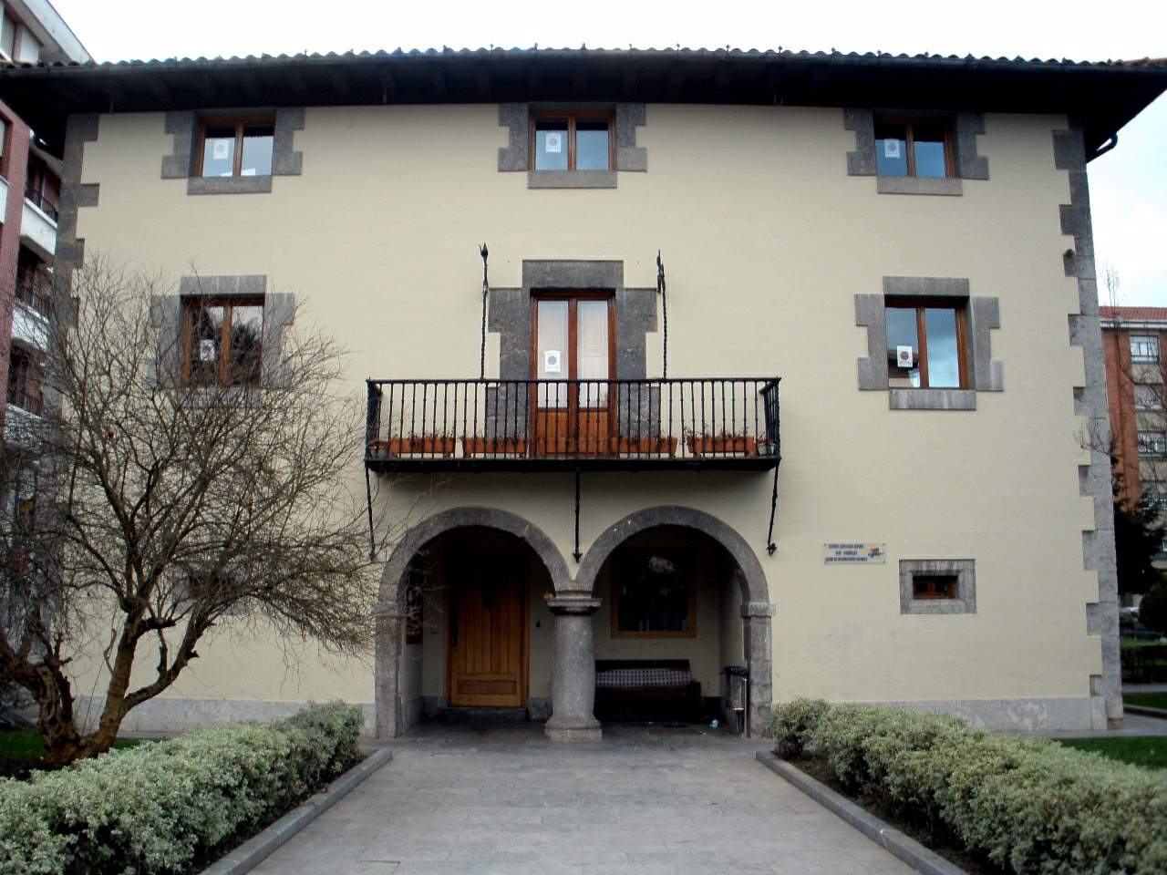 Palacio Jane (Ugao-Miraballes)